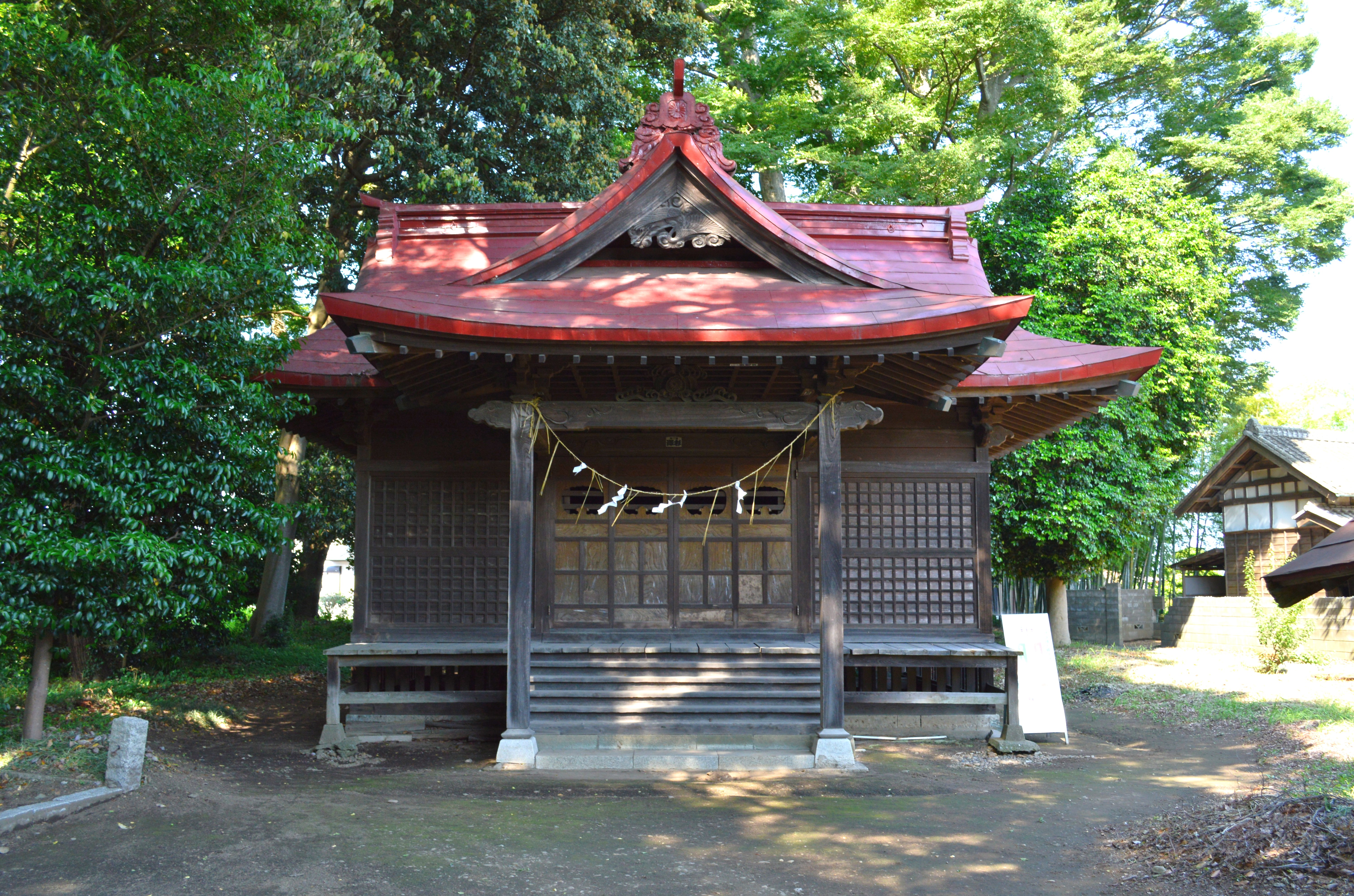 酒門神社 拝殿